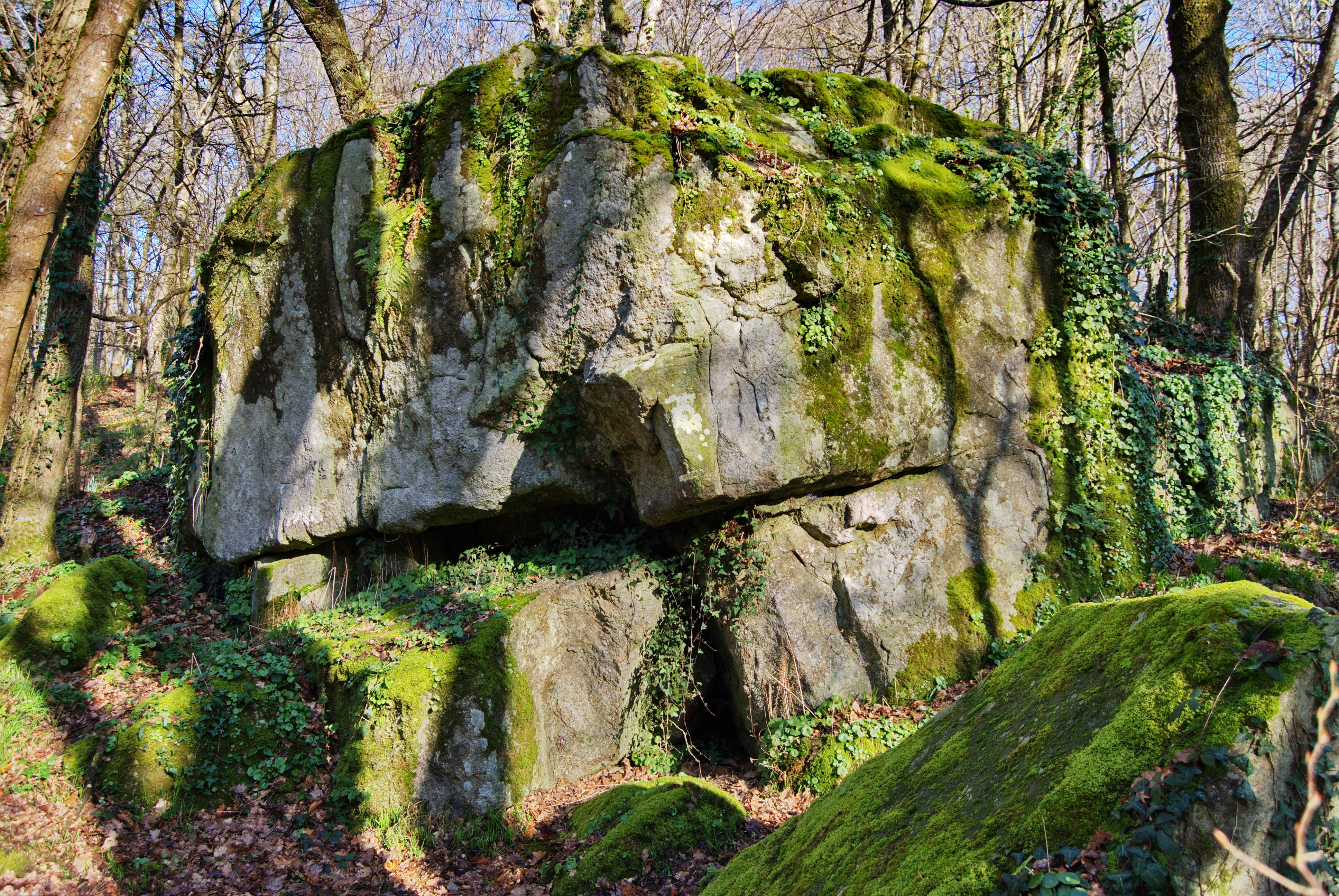 Monolithe situé sur le site des Aulnais à Lanrelas (22)